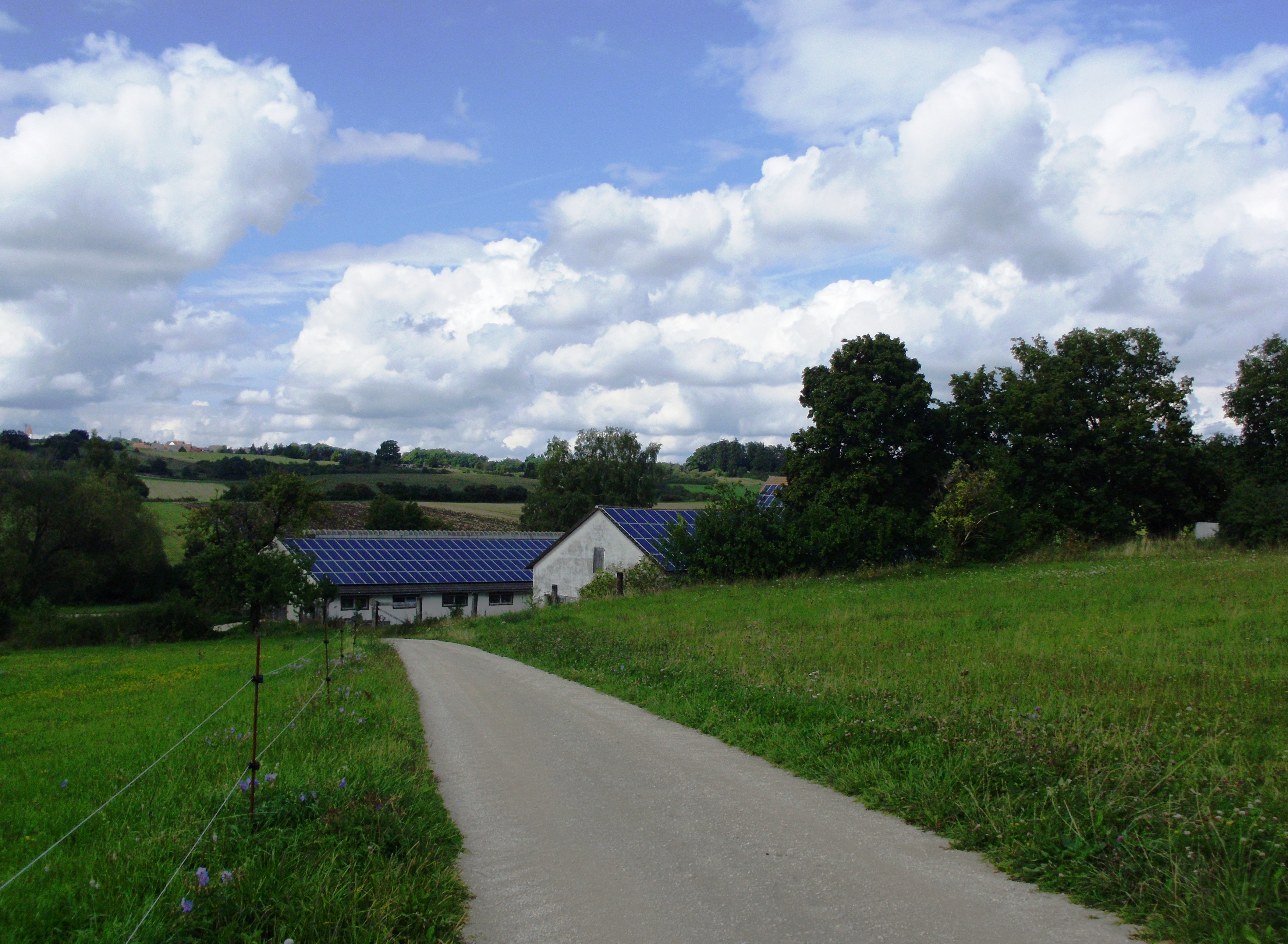 Hagenhof, Ortsteil von Treuchtlingen im Landkreis Weißenburg-Gunzenhausen